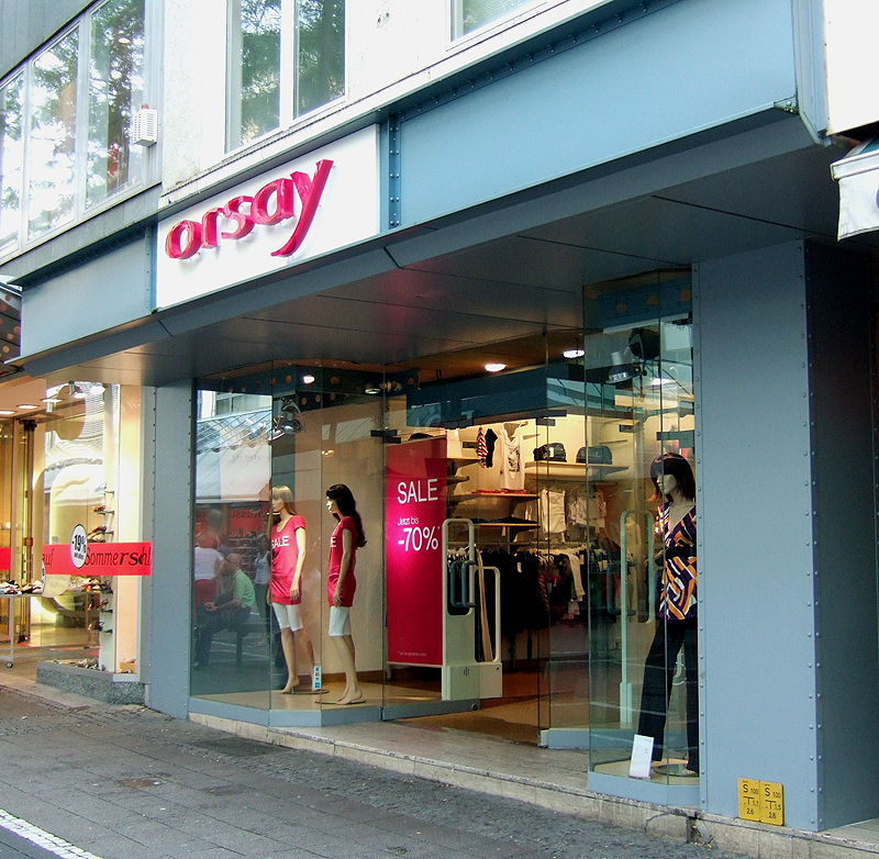 Orsay Geschäft in Darmstadt